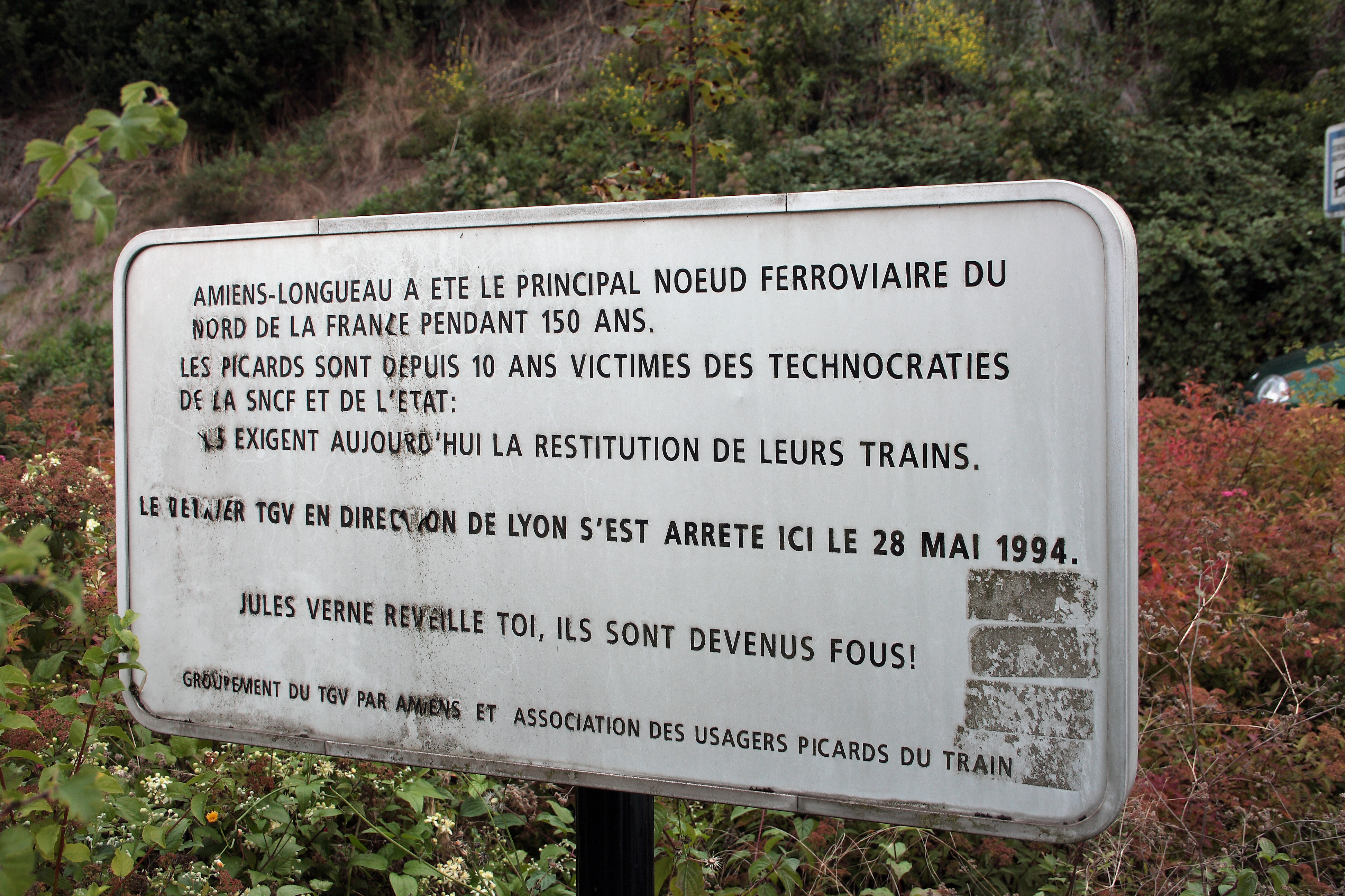 Situé sur le parking de l'ancien bâtiment voyageurs (place Lucien-Barbier, à Longueau), ce panneau dénonce la réduction de la desserte du « nœud ferroviaire d'Amiens-Longueau ». En effet, le TGV Lille – Lyon (créé en 1984), ainsi que les divers trains reliant Paris à Lille (et Tourcoing), circulent désormais sur la LGV Nord ; cette dernière évite de loin l'agglomération amiénoise (et donc ses gares principales).